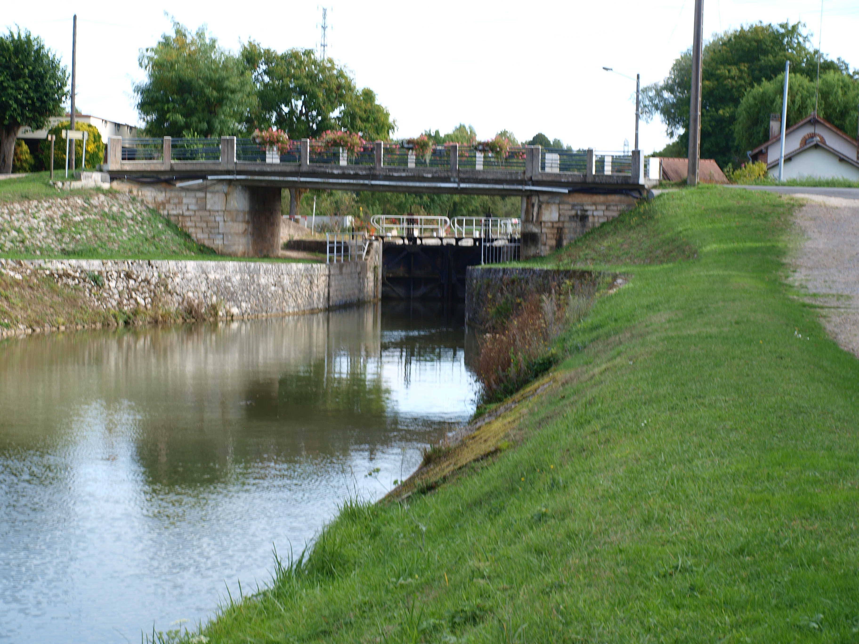 Amilly (Loiret, France) & le canal de Briare